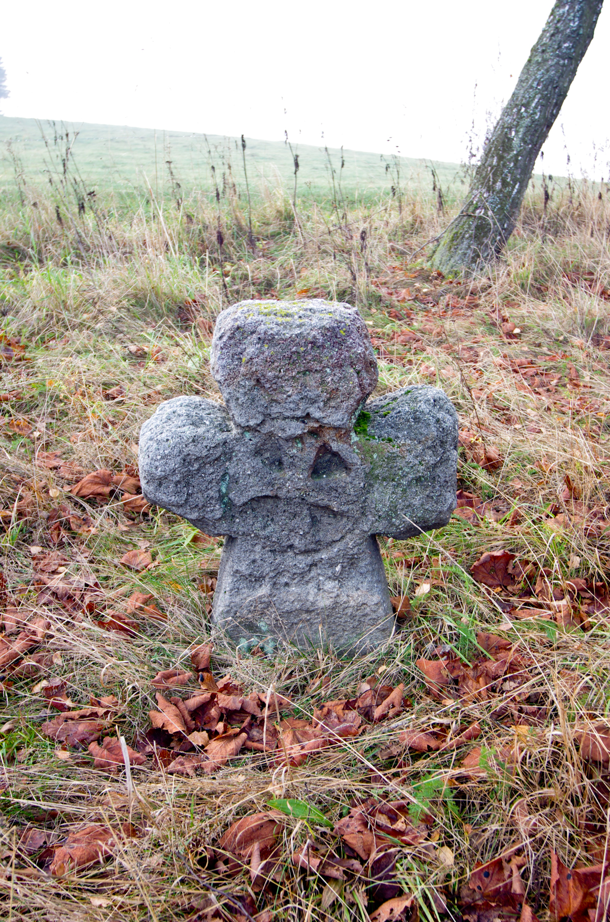 Smírčí kříž (Rudolec), 0,5km JV od Rudolce, Rudolec